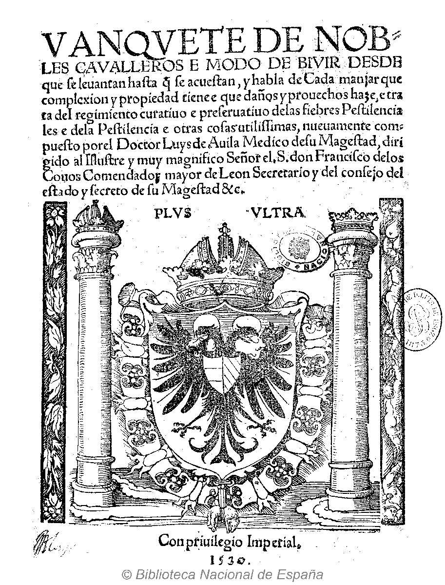 Título: Vanquete de nobles caualleros e modo de biuir desde que se leuantan hasta q[ue] se acuestan : y habla de Cada manjar que complexion y propiedad tiene e que daños y prouechos haze, e trata del regimiento curatiuo e preseruatiuo de las fiebres Pestilenciales e de la Pestilencia e otras cosas utilissimas nueuamente compuesto por el Doctor Luys de Auila ... Autores: Lobera de Ávila, Luis. Steiner, Heinrich (?-1548) Fecha: 1530 Datos de edición: In inclyta Vindelicorum Vrbe Augusta per industrium virū Henricum Stainerū chalcotypū